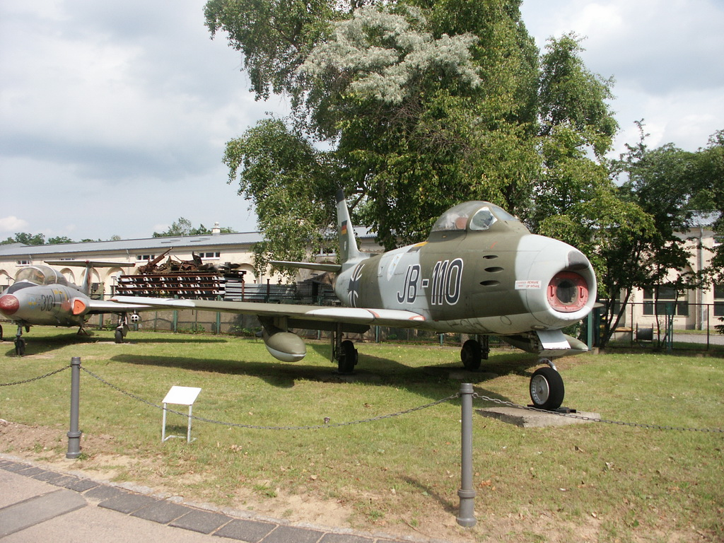 Bundeswehrmuseum Dresden mit Teilen von der NVA